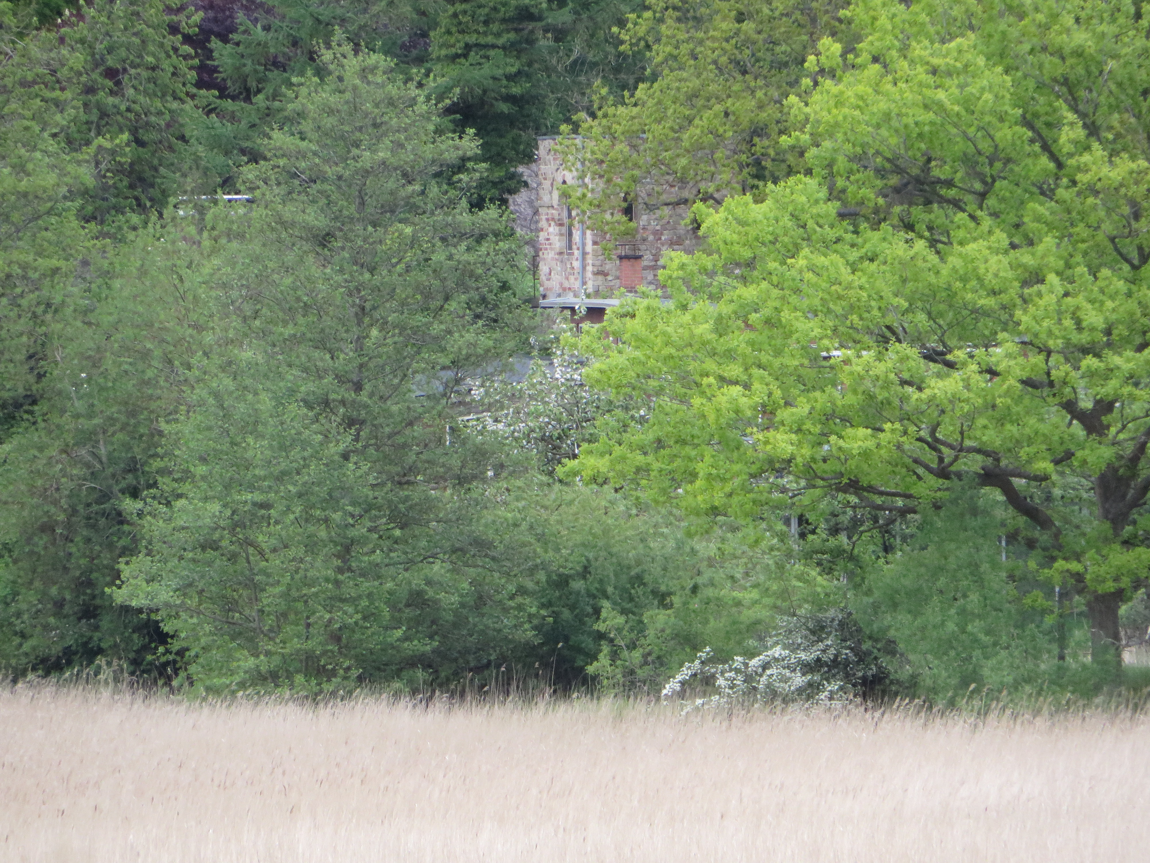 Ruine Erlkron, Glücksburg, 25 Mai 2015, Bild 01; Die Ruine von oberhalb des Schwennautales.